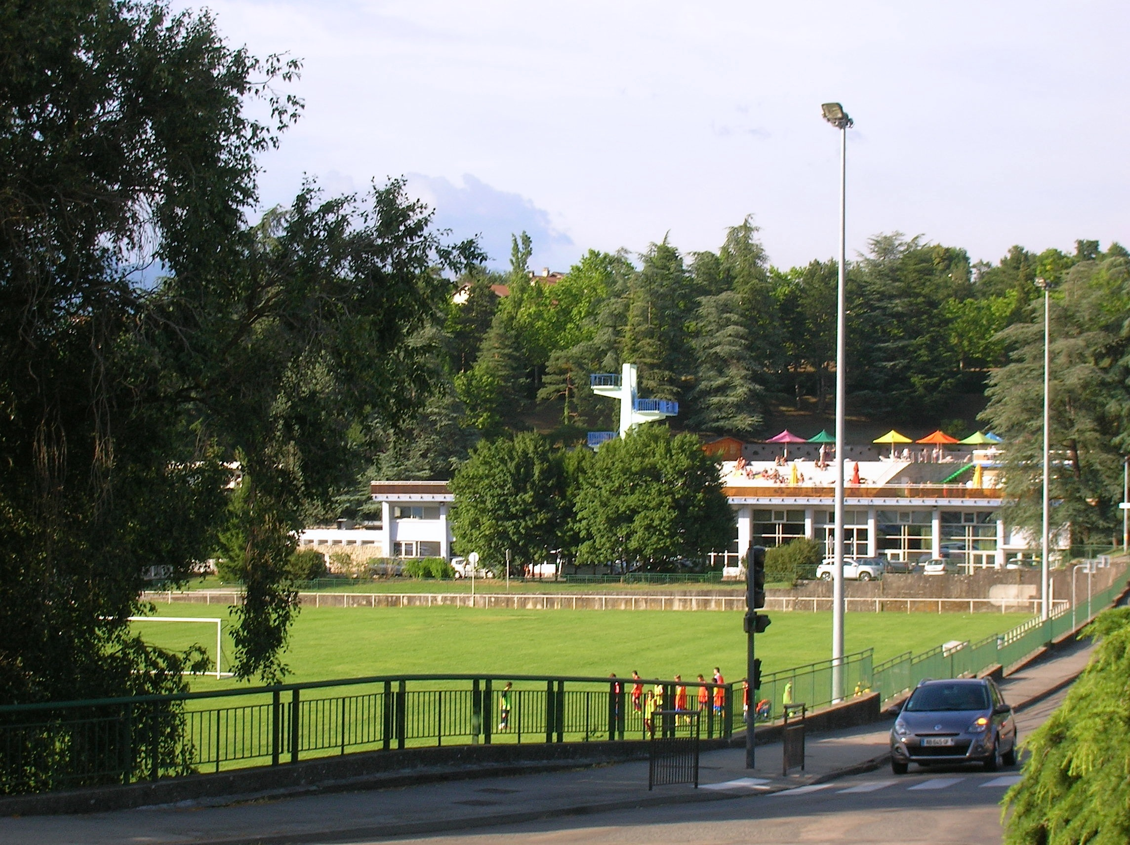 Eybens, Isère, Rhone Alpes, France.